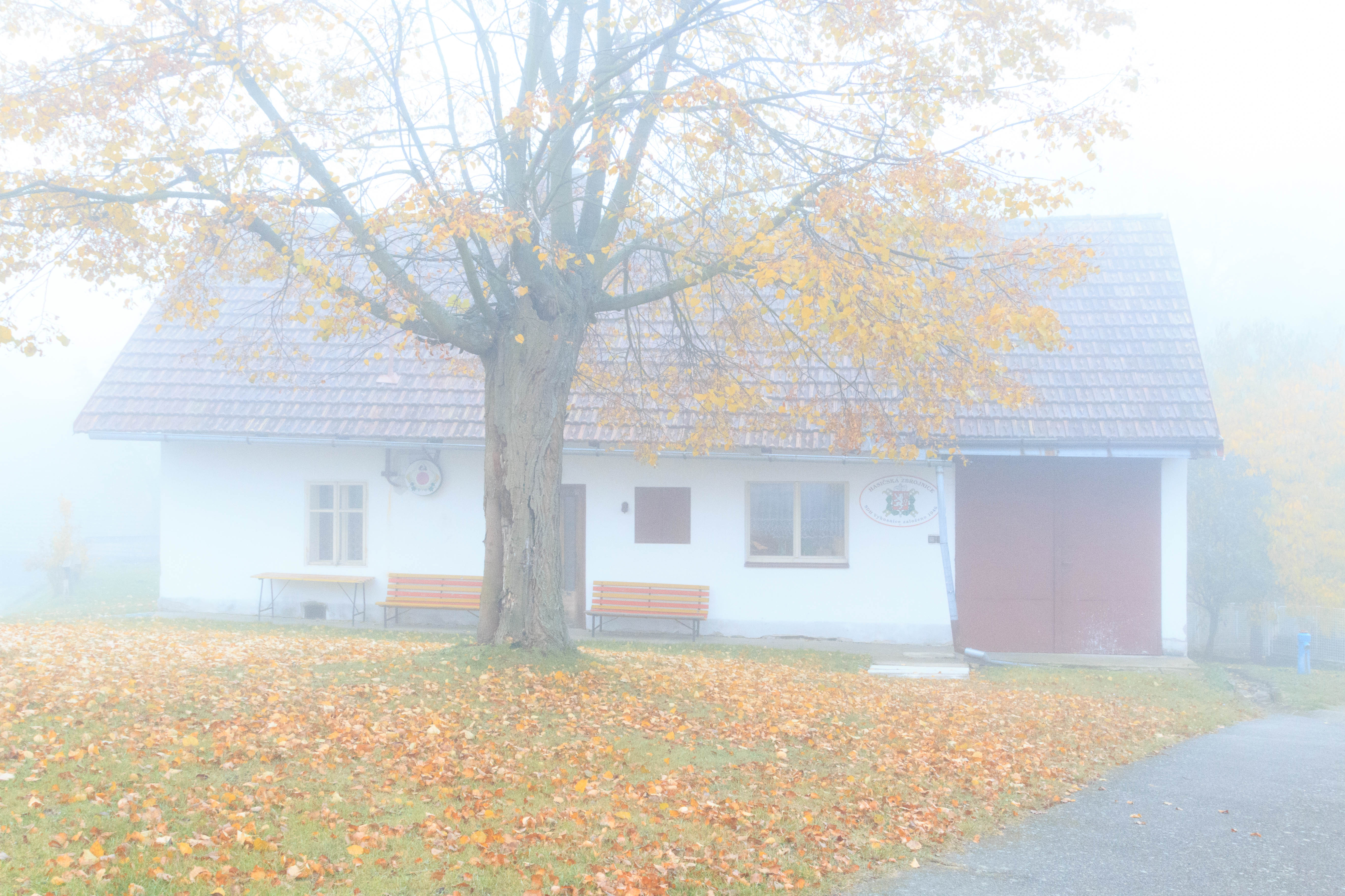 Vyhnanice u Voděrad - hasičská zbrojnice